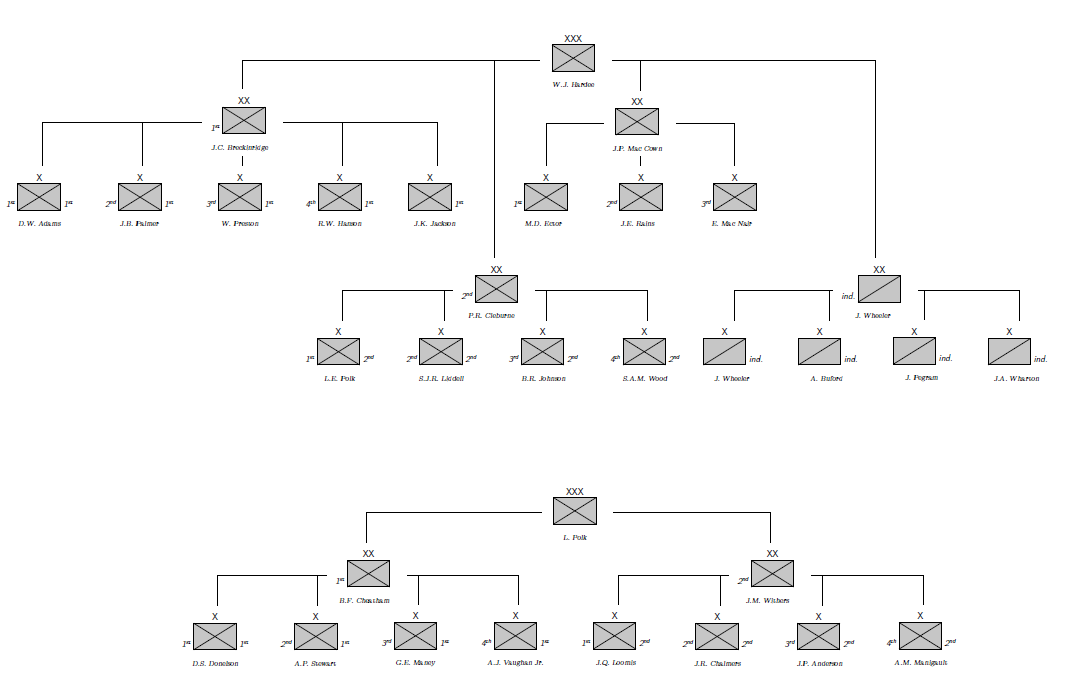 Ordre de bataille des confédérés à la bataille de Stones River